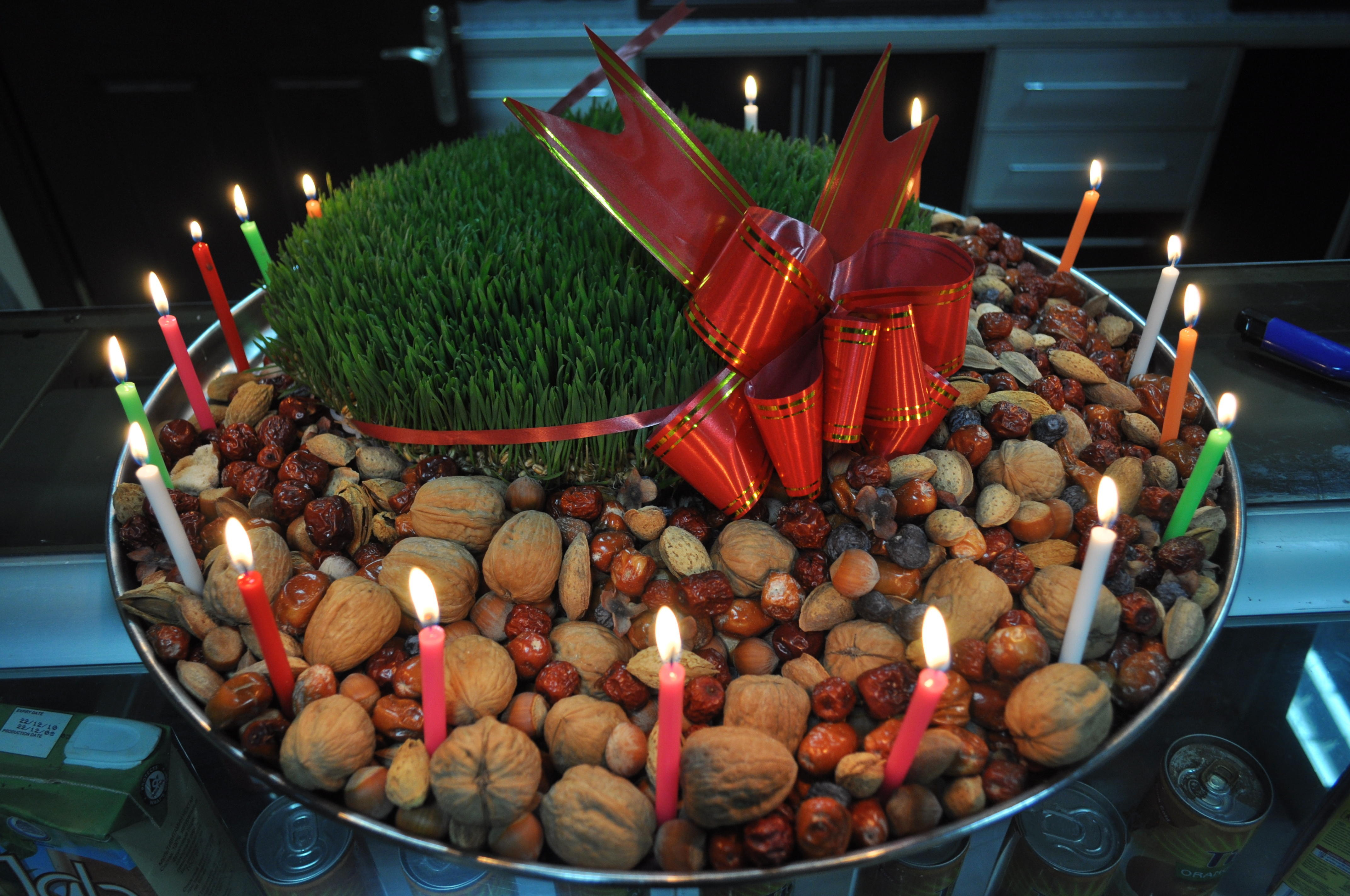 Novruz xonçası, Bakı, Azərbaycan.